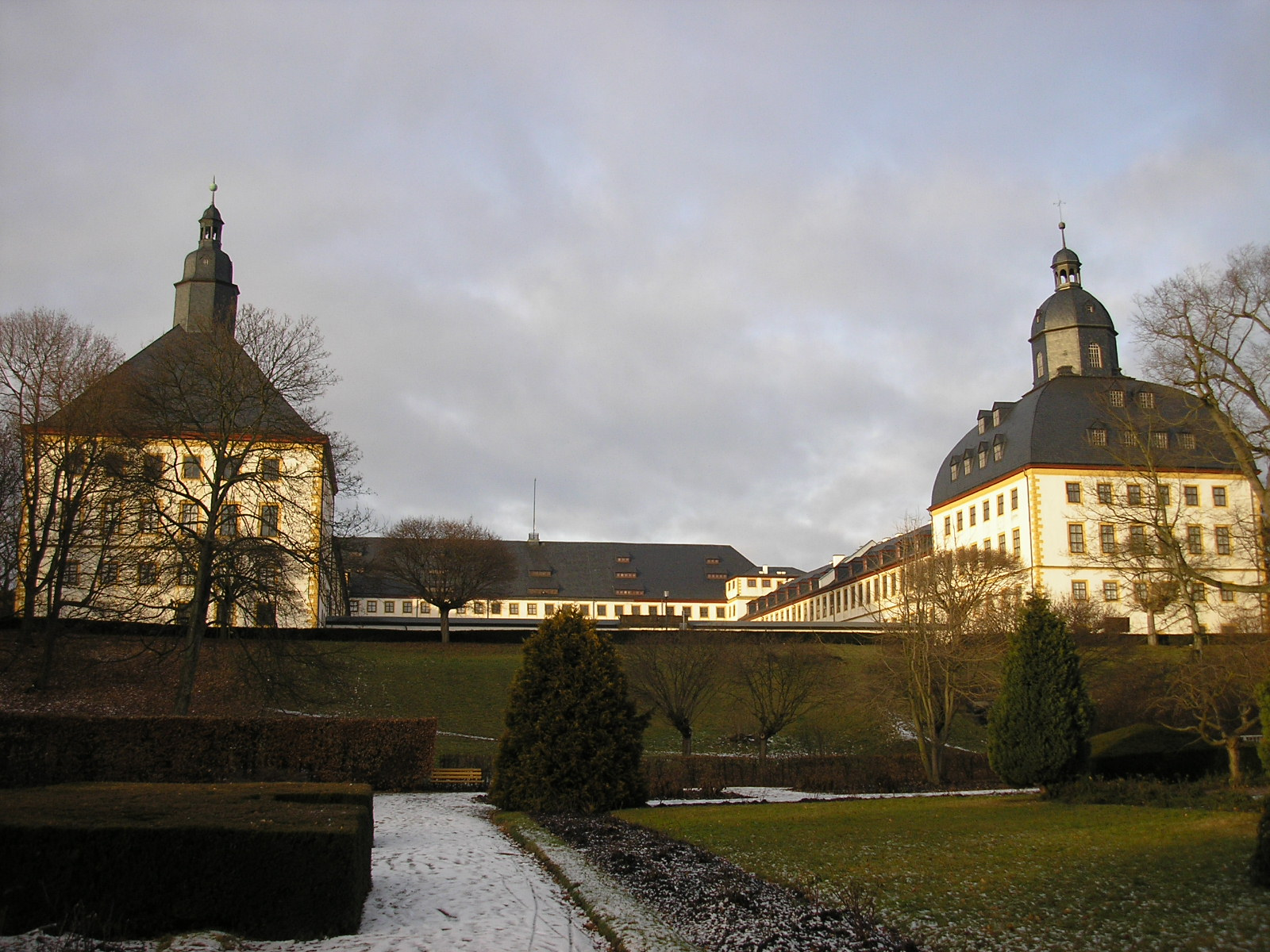 Schloss Friedenstein in Gotha (Thüringen).